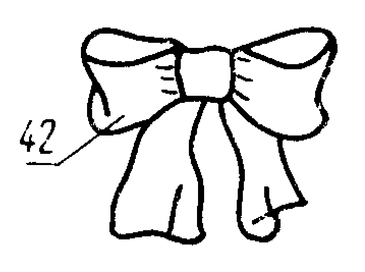 Изображение из ГОСТ 22977-89 (СТ СЭВ 6484-88) — Детали швейных изделий. Термины и определения.